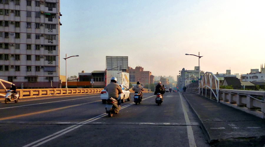 位於鳳山區的維新陸橋（2012年2月10日往光復路方向拍攝）